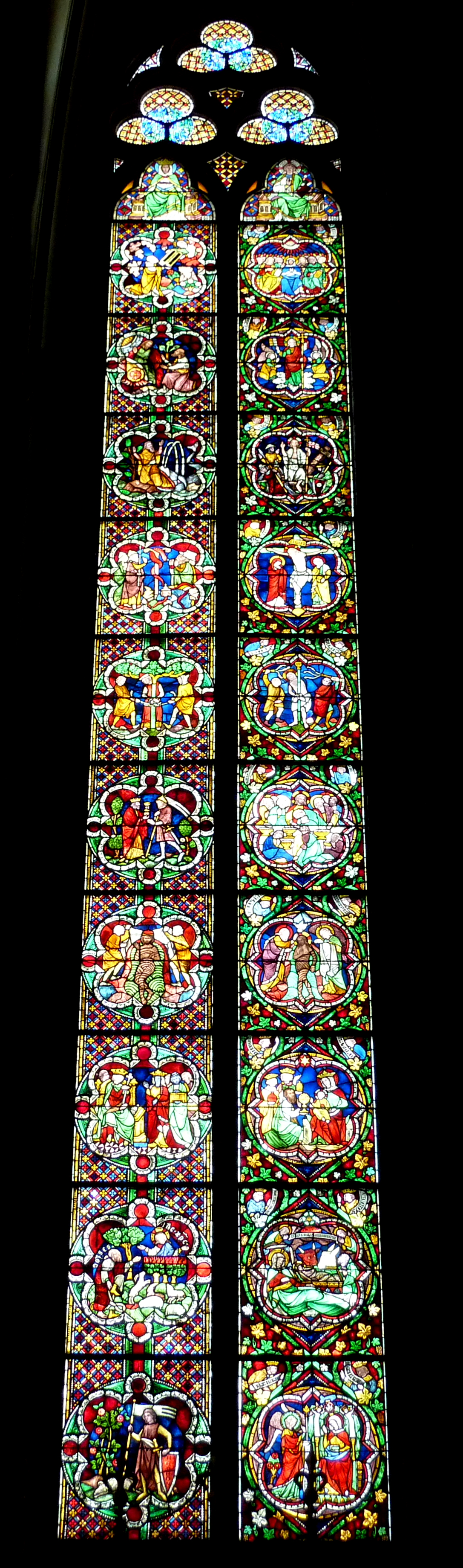 "Jüngeres Bibelfenster" im Chor des Kölner Doms